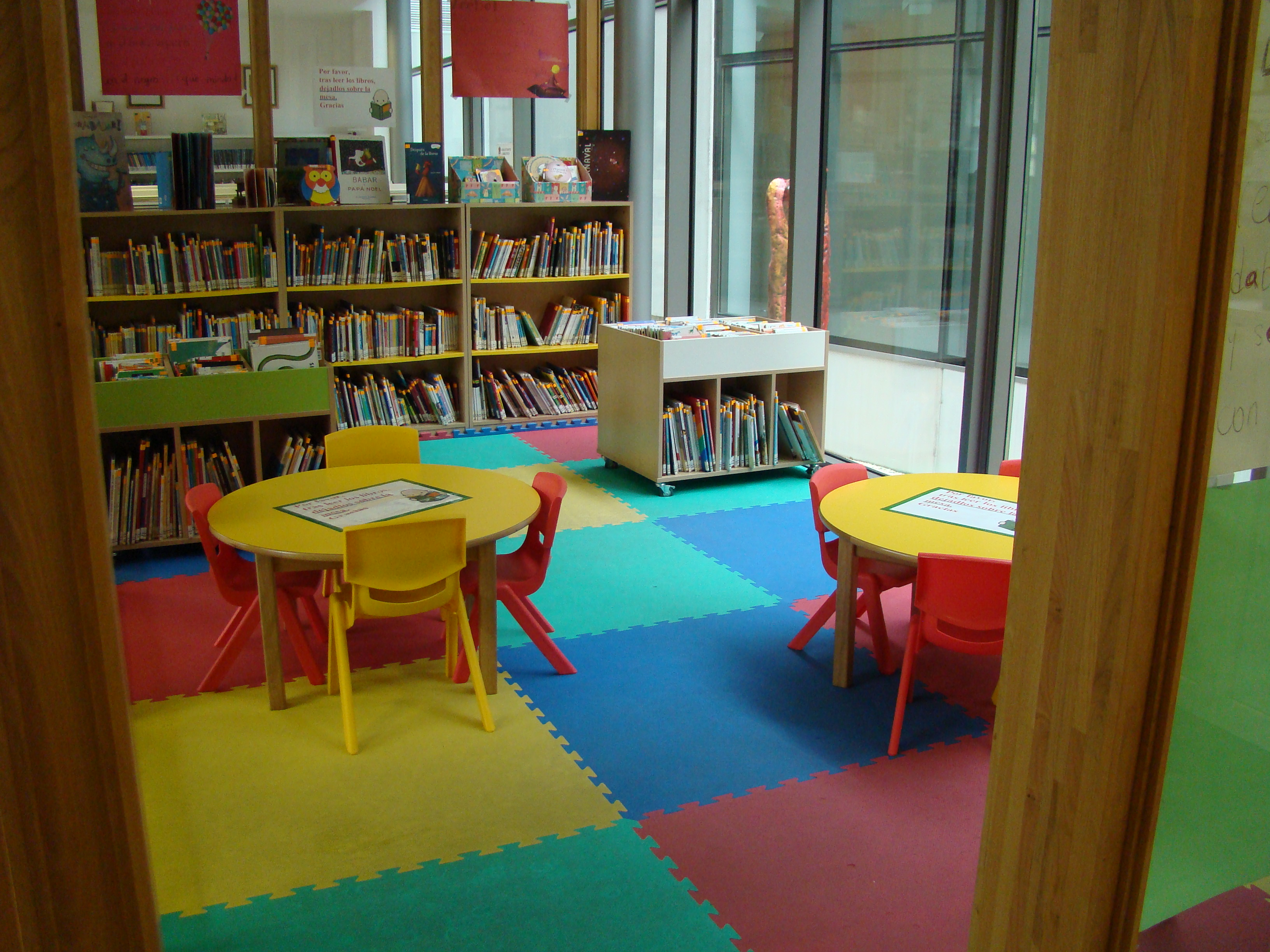 Rincón de la bebeteca de La Pola Siero